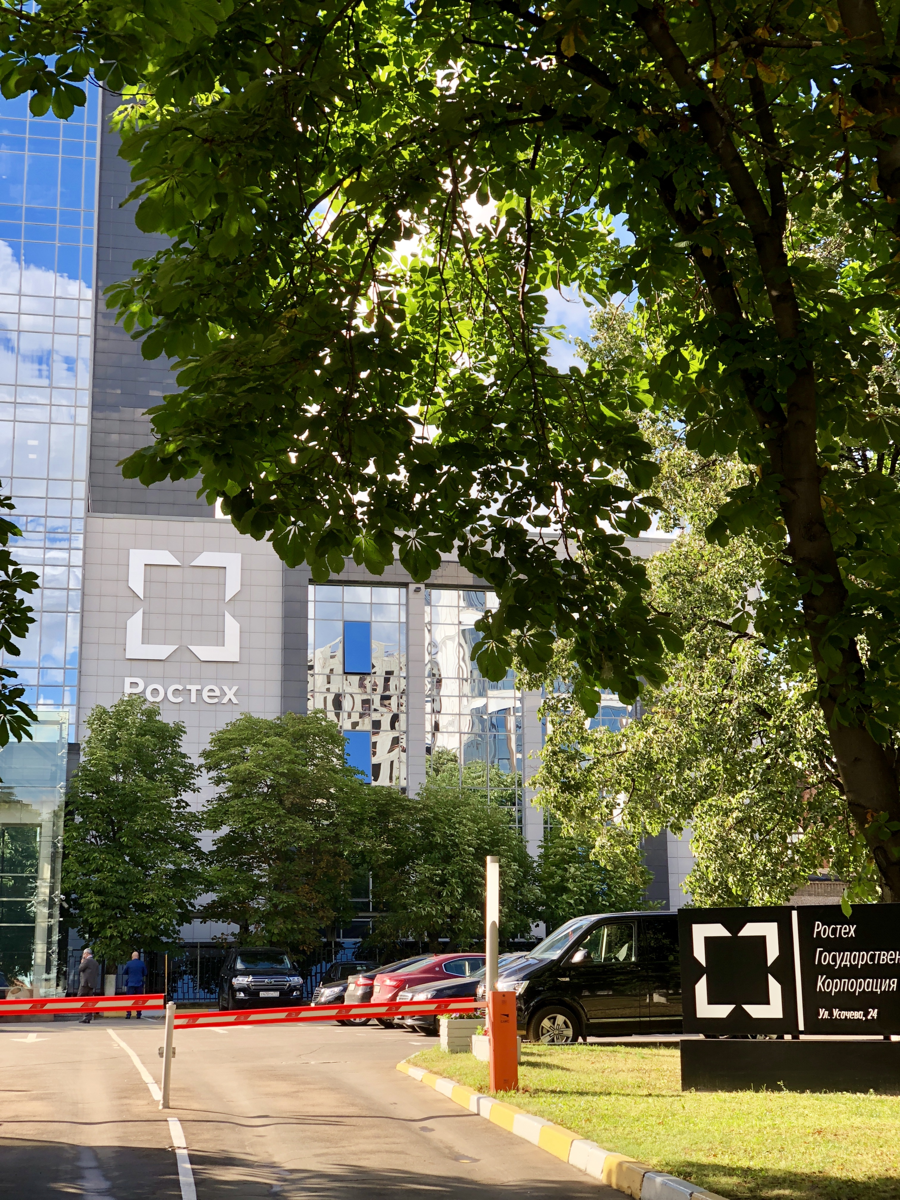 Офис Ростех в Москве